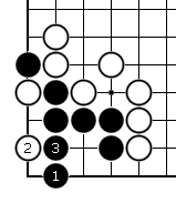 詰棋問題1解答